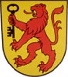 Blazon of Benken, Canton of St. Gallen - Blazono de Benken, Kantono de Sankt-Galo